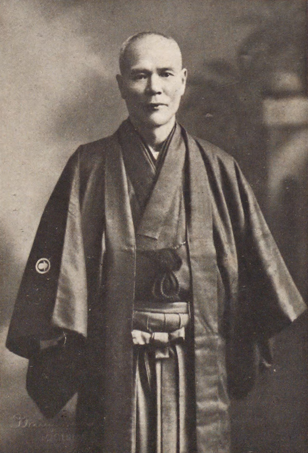 Portrait of Koizumi Sakutaro (小泉策太郎, 1872 – 1937)